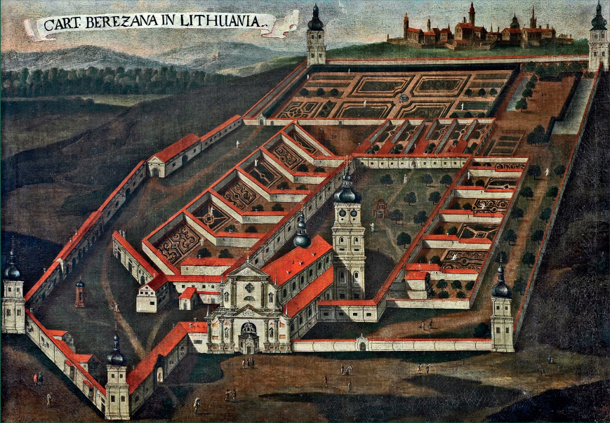 Беларуская (тарашкевіца): Бяроза Картуская (Biaroza Kartuskaja), вуліца Кляштарная (vulica Klaštarnaja). Кляштар картузаў